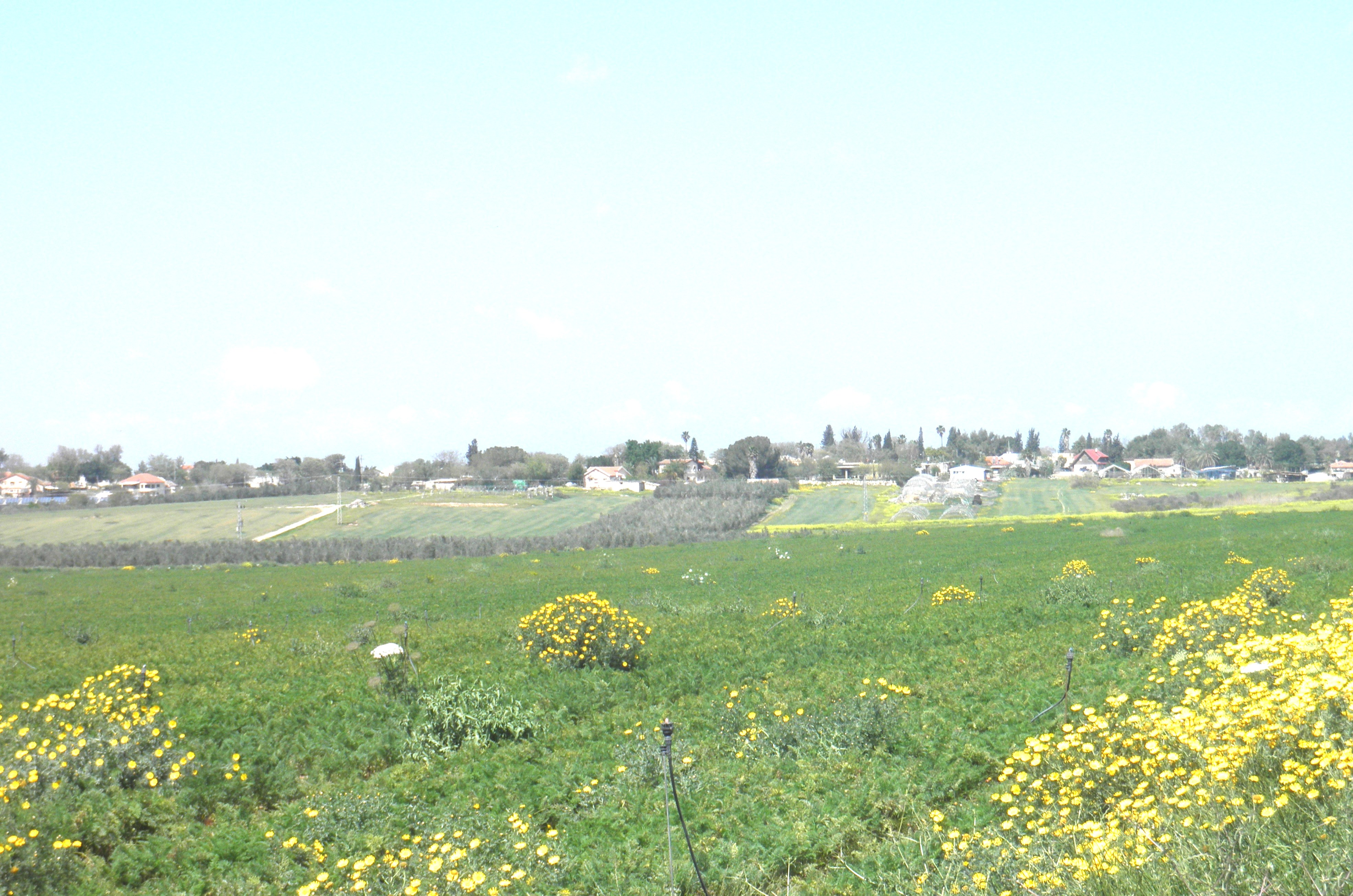 מבט על המושב